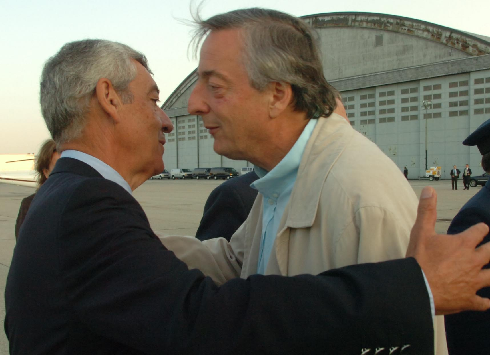 Kirchner y José Octavio Bordón